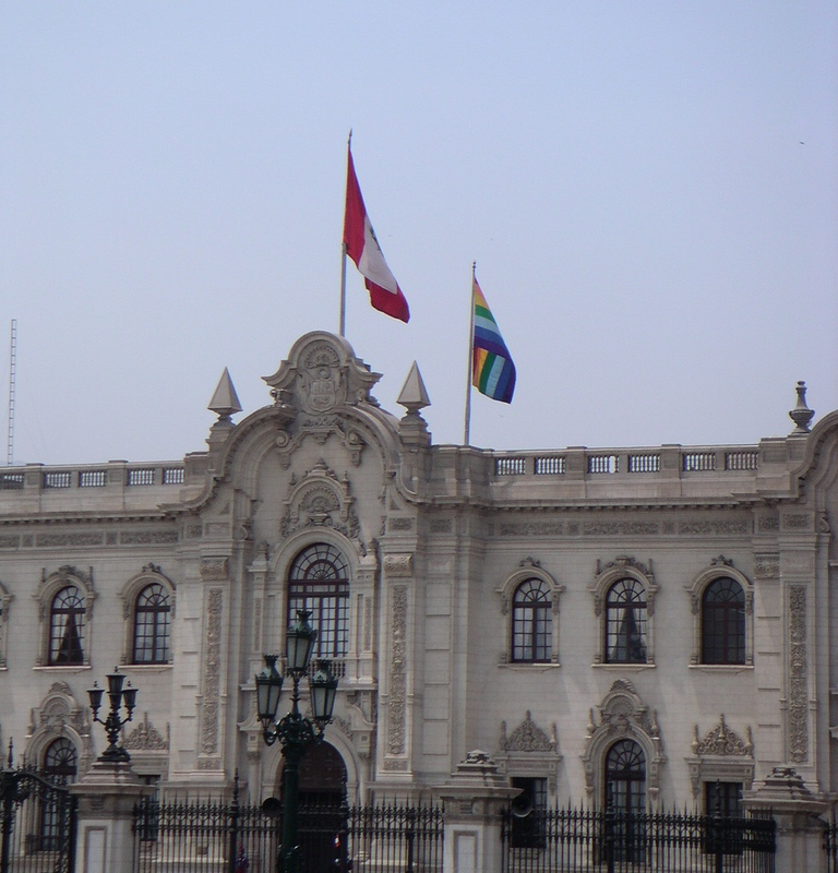 Palace of Government, Lima, PeruPalacio del Gobierno